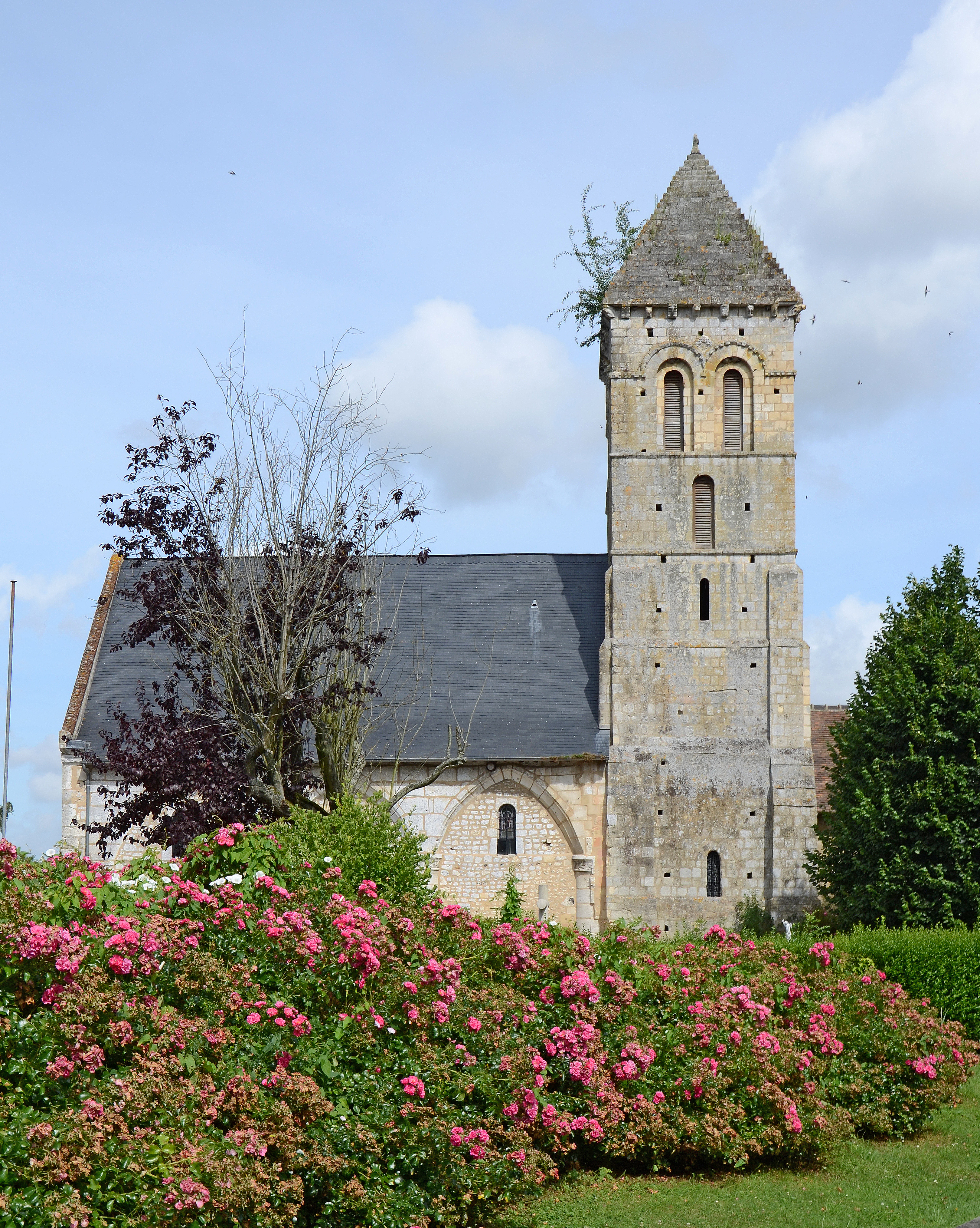 Eglise St Pierre a Azier, Eure, France .